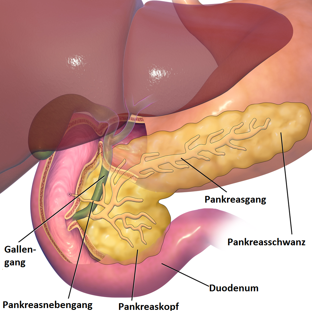 Pankreasanatomie